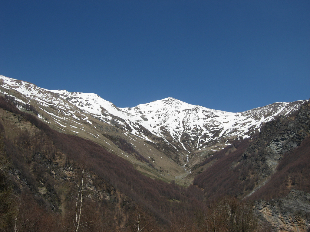 Шарпланинискиот врв Чаушица (2.620 m)